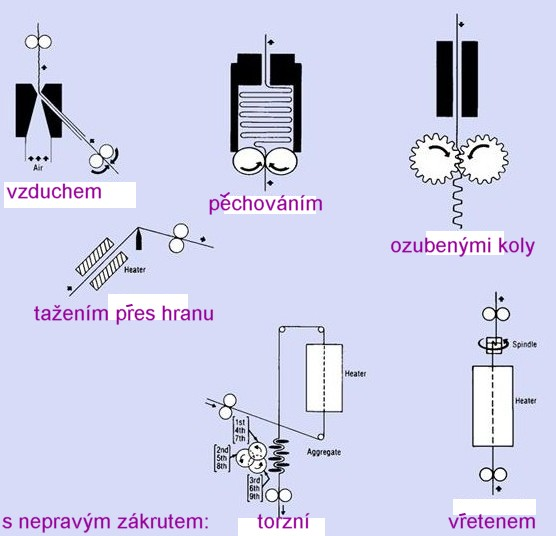 Texturiertechniken